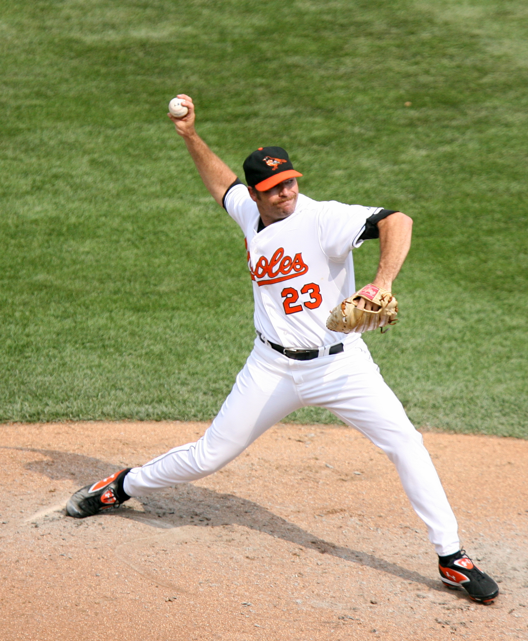 Paul Shuey